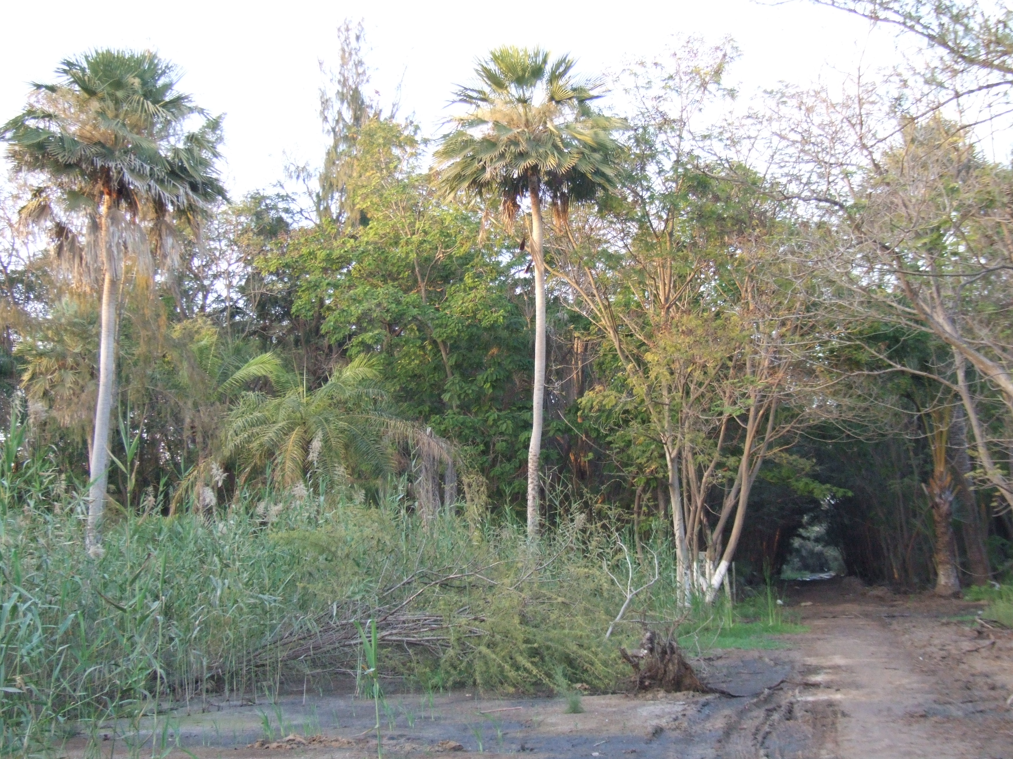 Parc forestier et zoologique de Hann (Dakar, Sénégal)